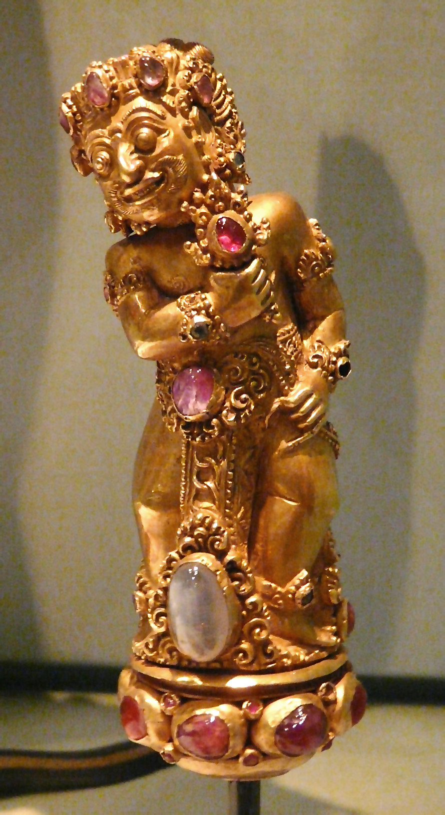 Krisgreep in de vorm van een godenfiguur goud en edelstenen. Bali, Indonesië. 19th century Kris handle in the form of a god figure.The figures on kris handles often depict gods or demons and possibly have a protective function. Foto gemaakt tijdens Wiki Loves Art workshop in het Tropenmuseum, Amsterdam op 26 juni 2009